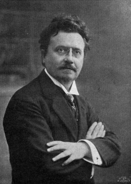 De Vlaamse schrijver Raf Verhulst (1866-1941).